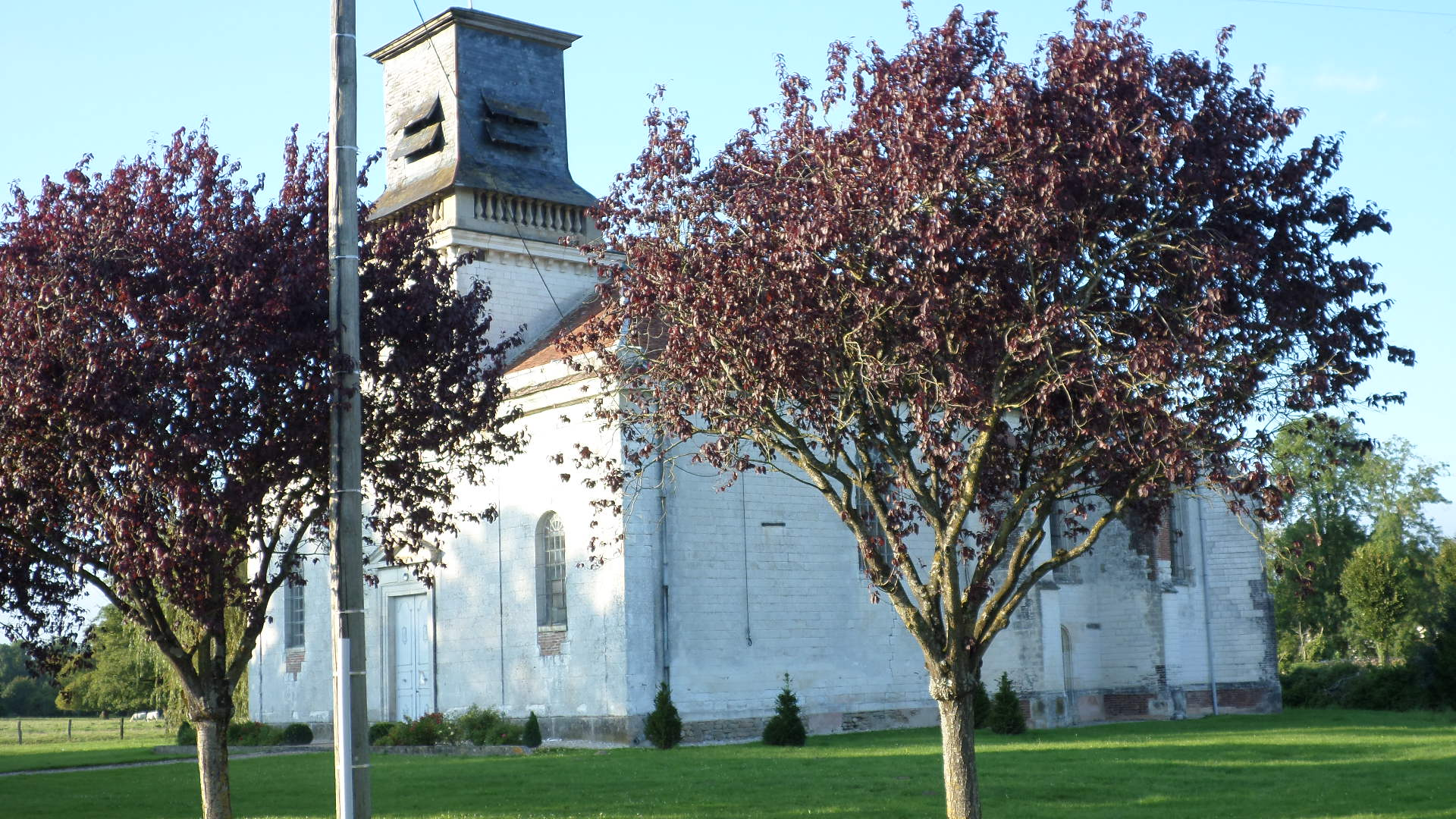 Église de l'Immaculée-Conception .